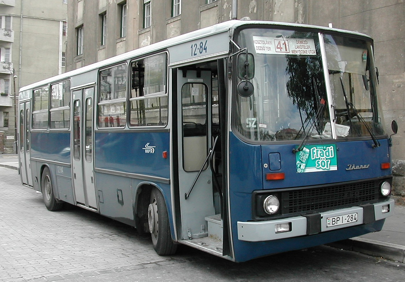 Ikarus_260.03_in_Budapest